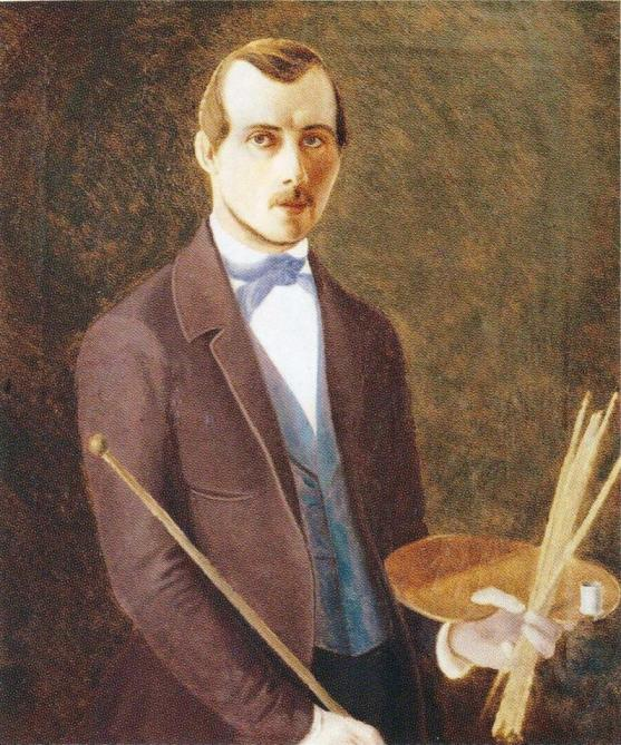 Ferdinand von Wrightin maalaus Omakuva paletti kädessä. Kuuluu yksityiskokoelmaan.